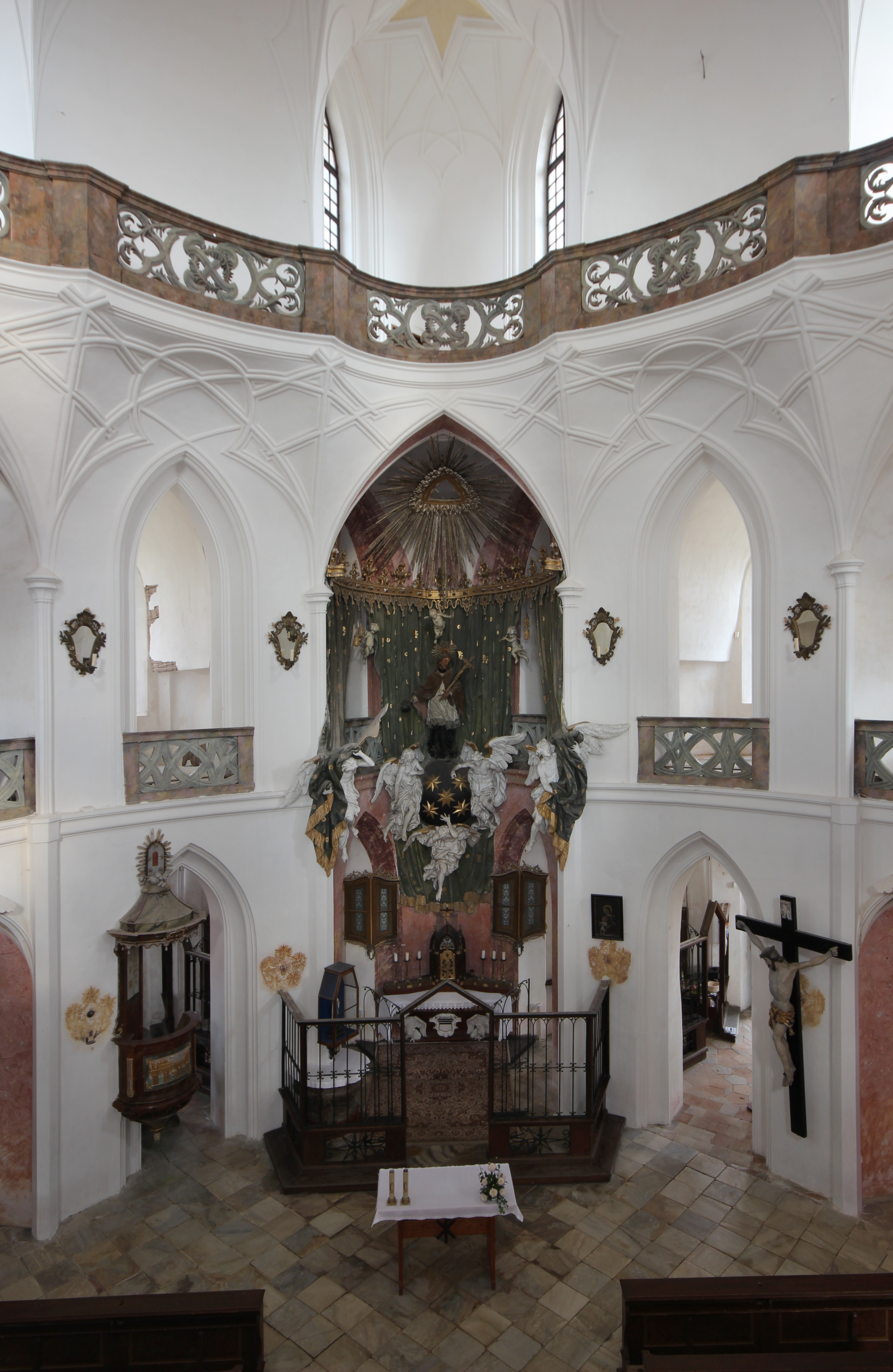 Poutní kostel sv. Jana Nepomuckého na Zelené hoře.